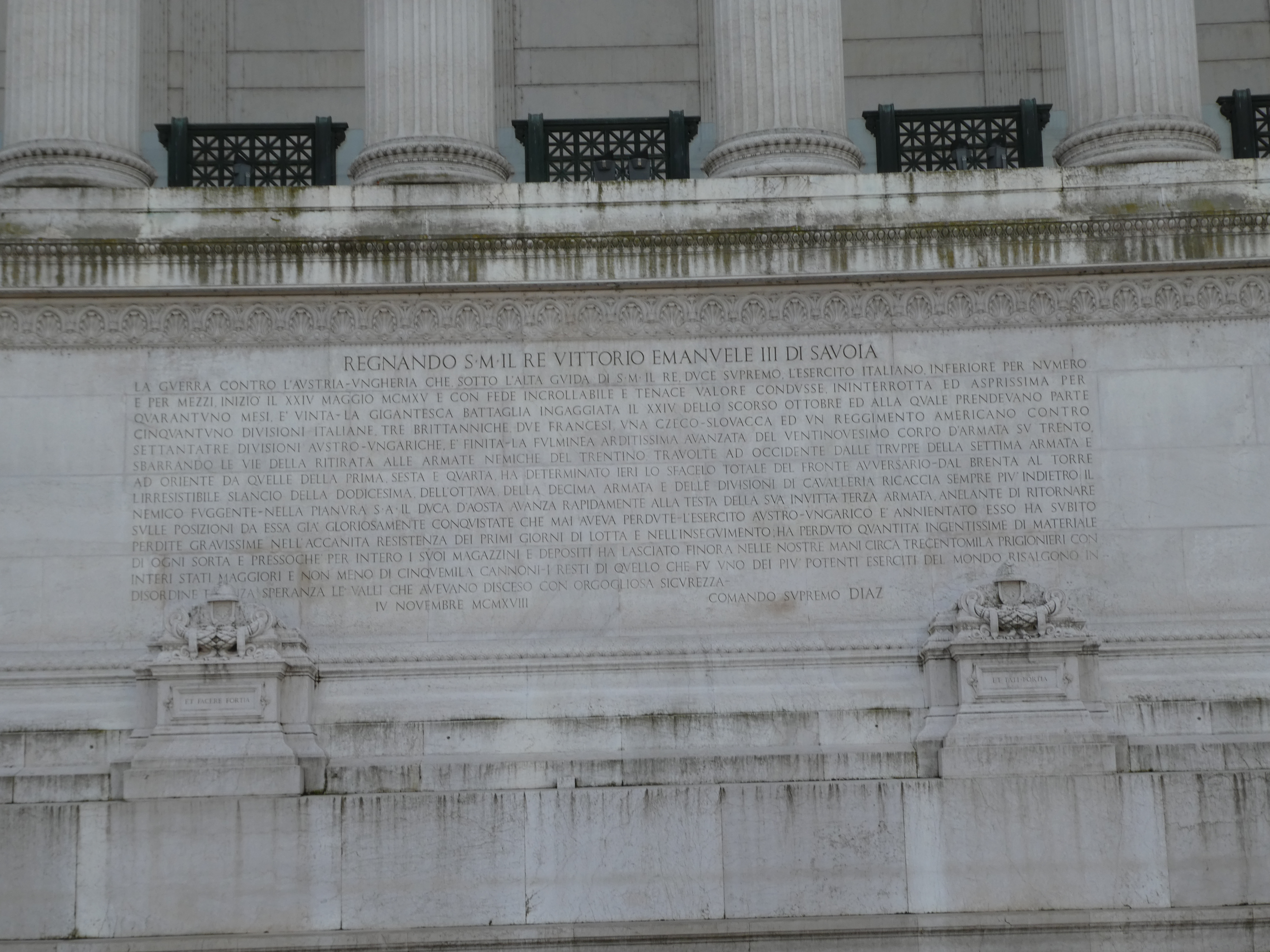 vedi titolo